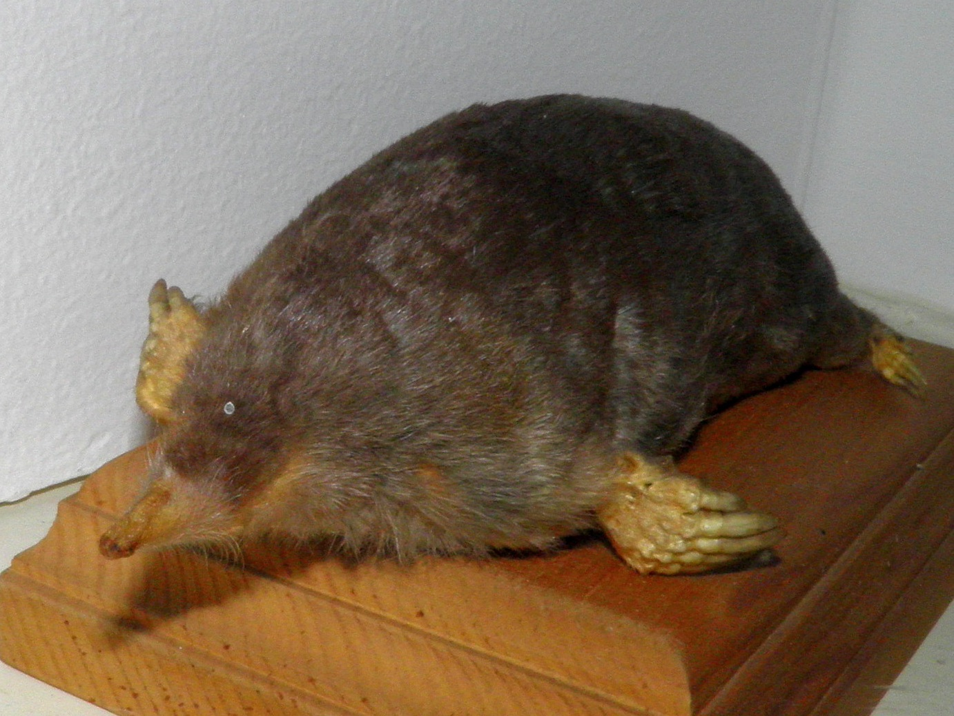 Японская могера (Mogera wogura) в Научном музее ДВФУ (г. Владивосток)